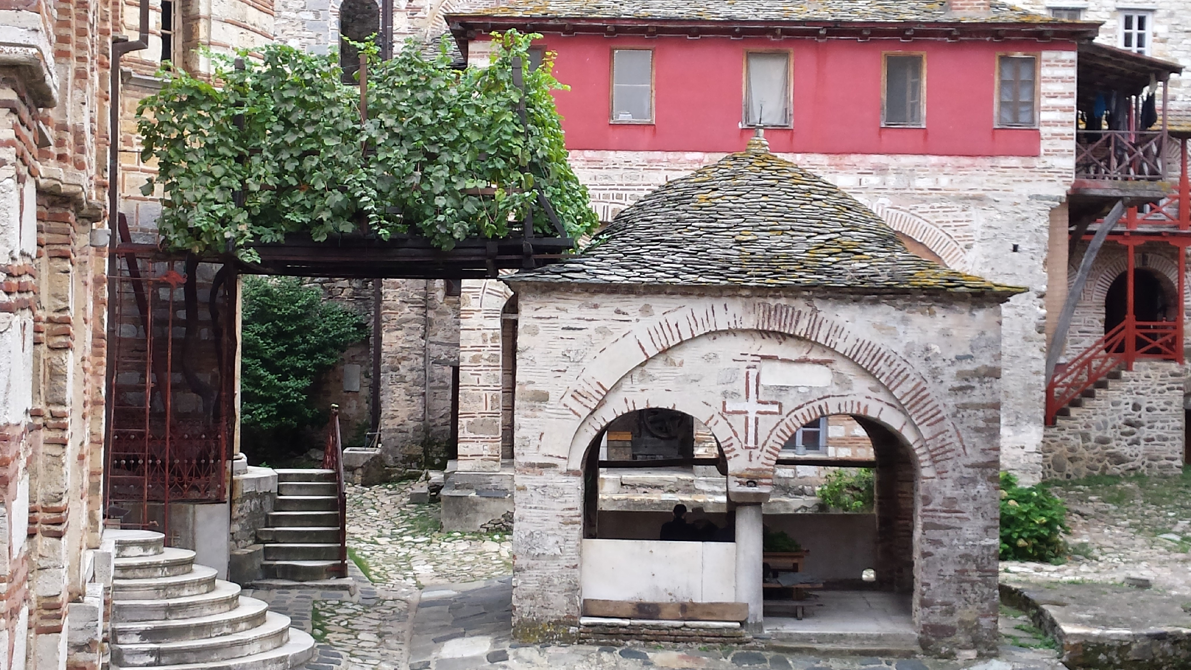 Хиландар